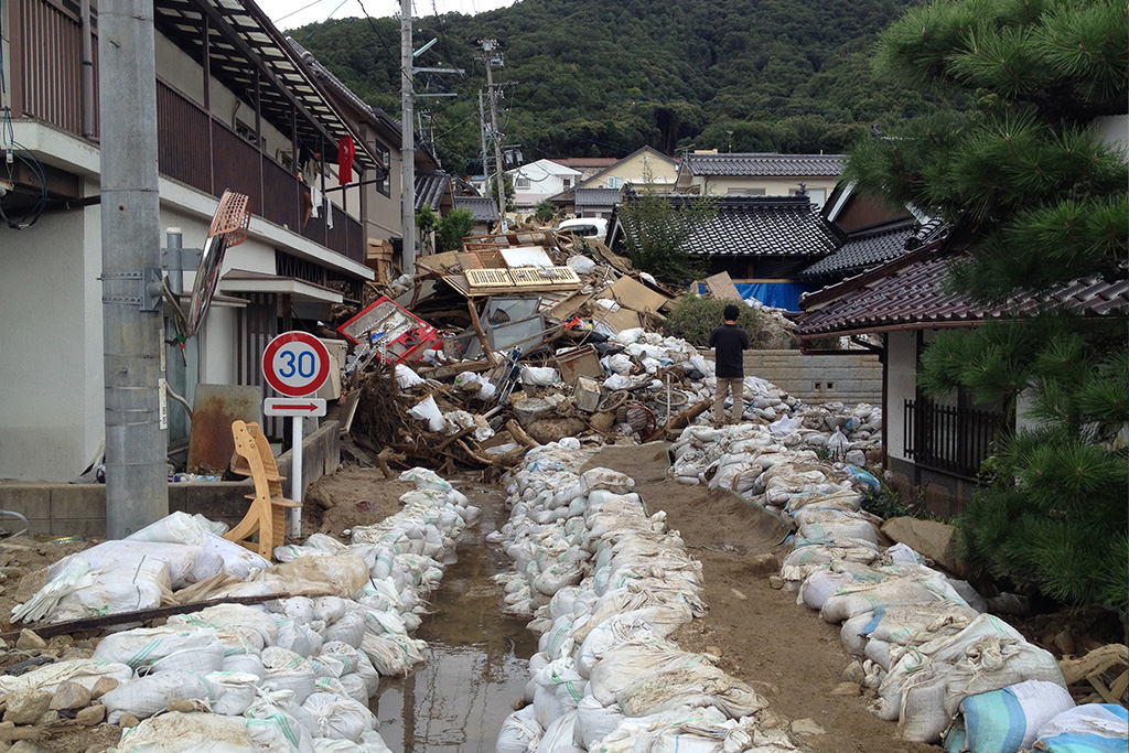 2014年の広島で起こった土砂災害の様子。